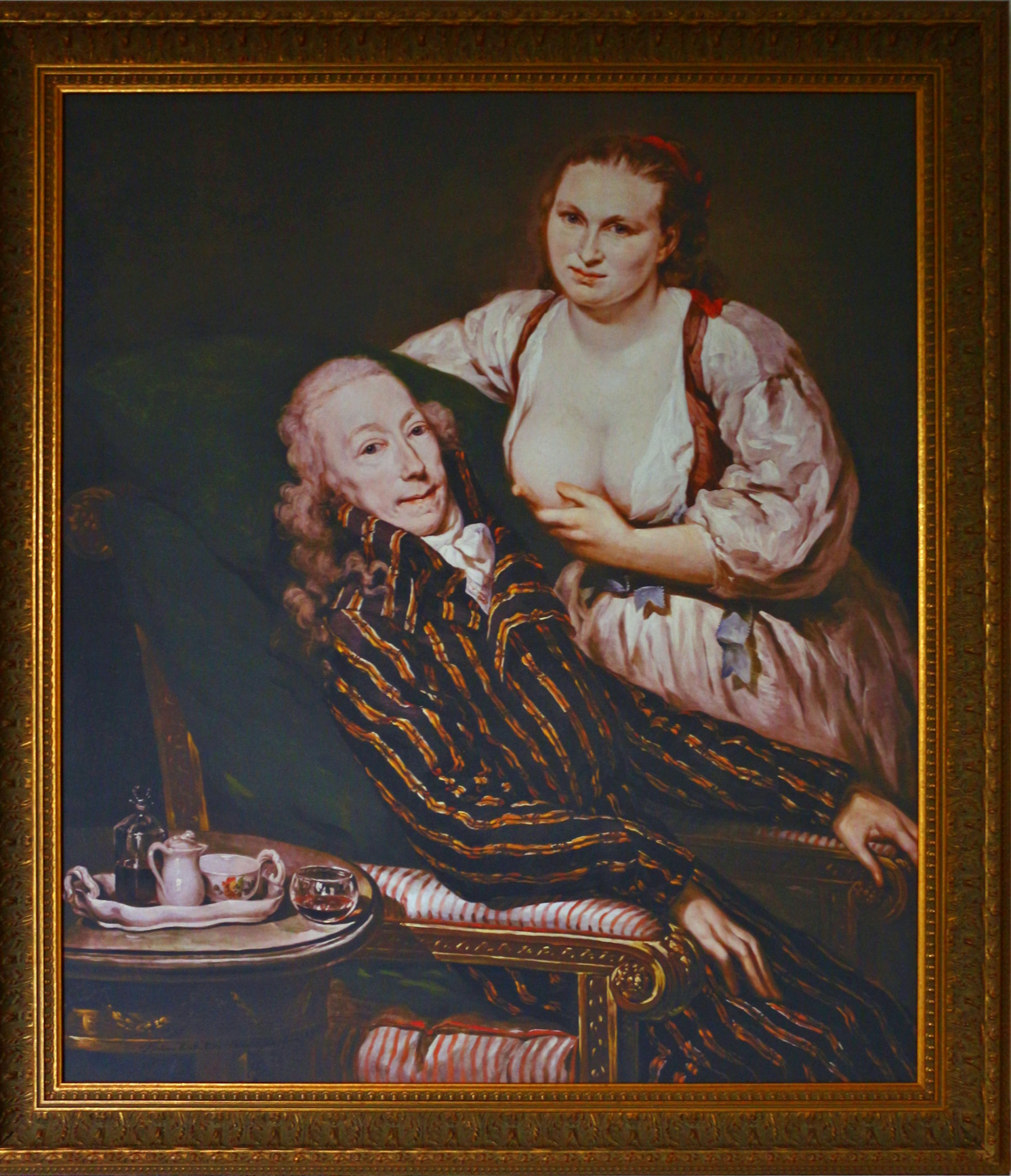 František de Paula hrabě Hartig a jeho manželka Eleonora jako Caritas Romana, Barbara Krafftová olej na plátně, 1797